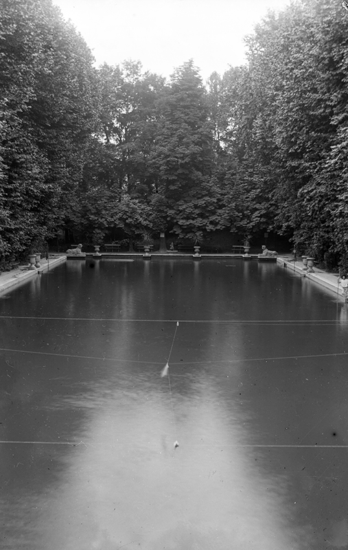 Piscina del Bagno Diana a Porta Venezia, ca. 1900, foto Leone Soldati, gelatina ai sali d’argento su lastra stereoscopica, 4,5×10,7 cm. Archivio Soldati, Milano.